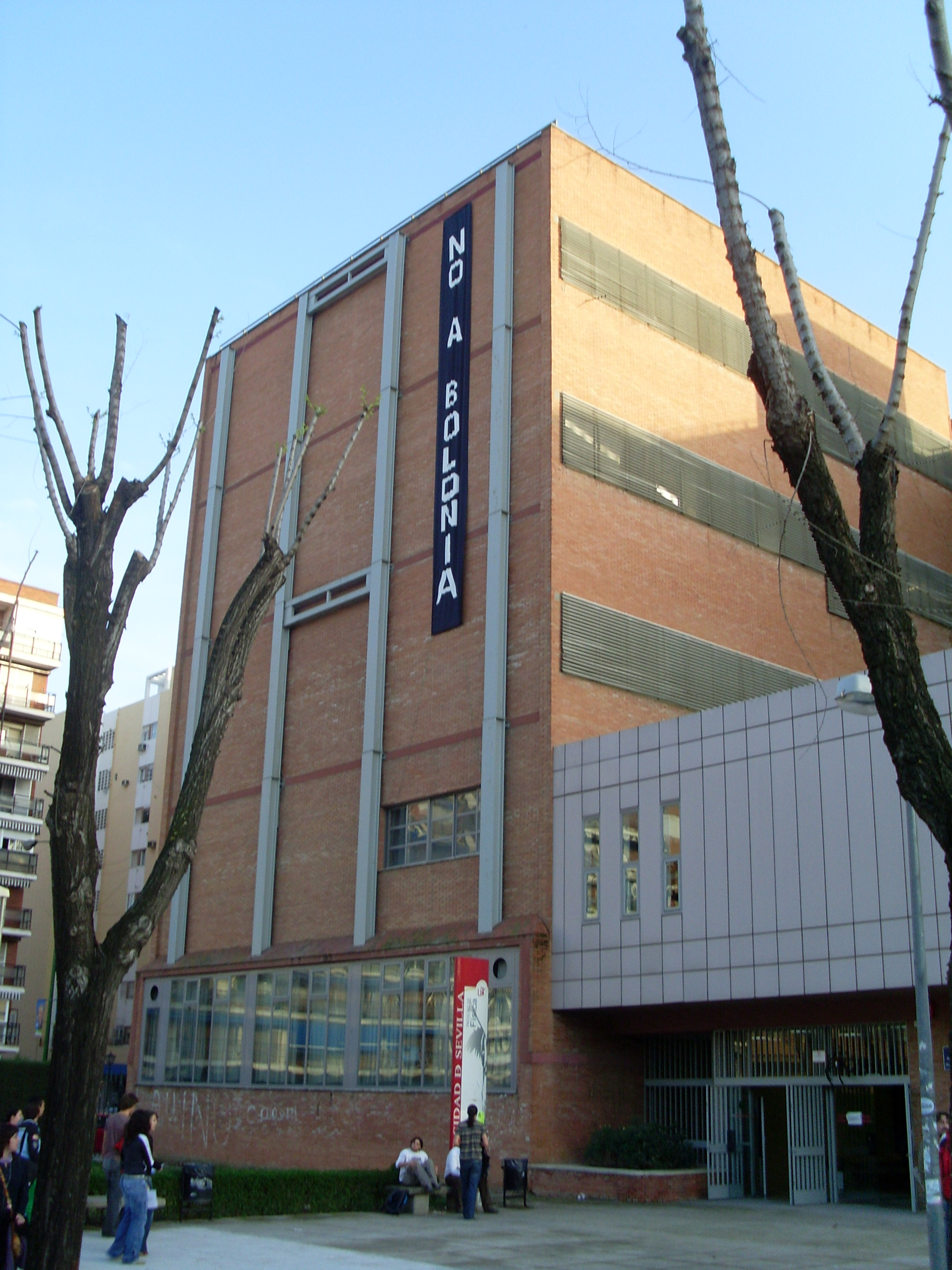 Foto de la facultad de física de Sevilla. Movilizaciones contra la implantación de los nuevos planes de estudio.